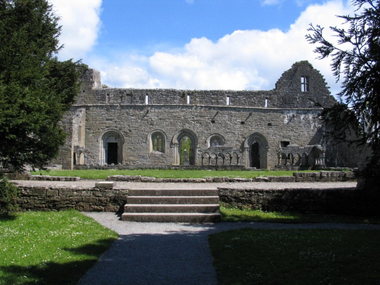 Ruine der Cong Abbey